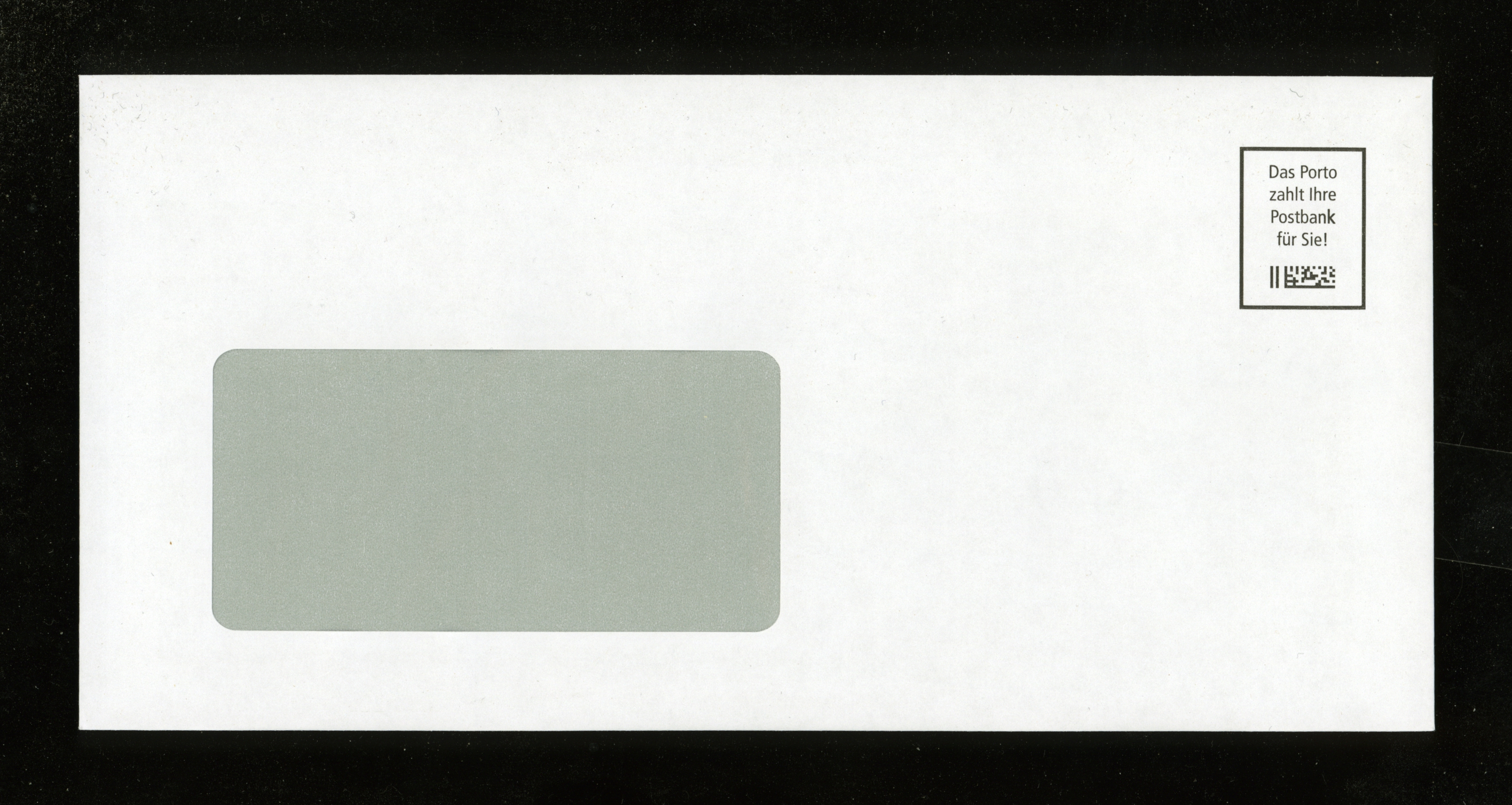 Werbeantwort der Postbank